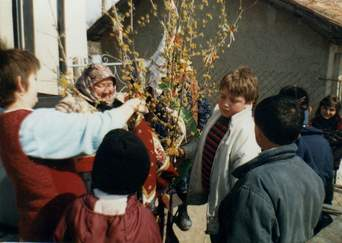 Navrez Bairam celebration in Bulgaria.